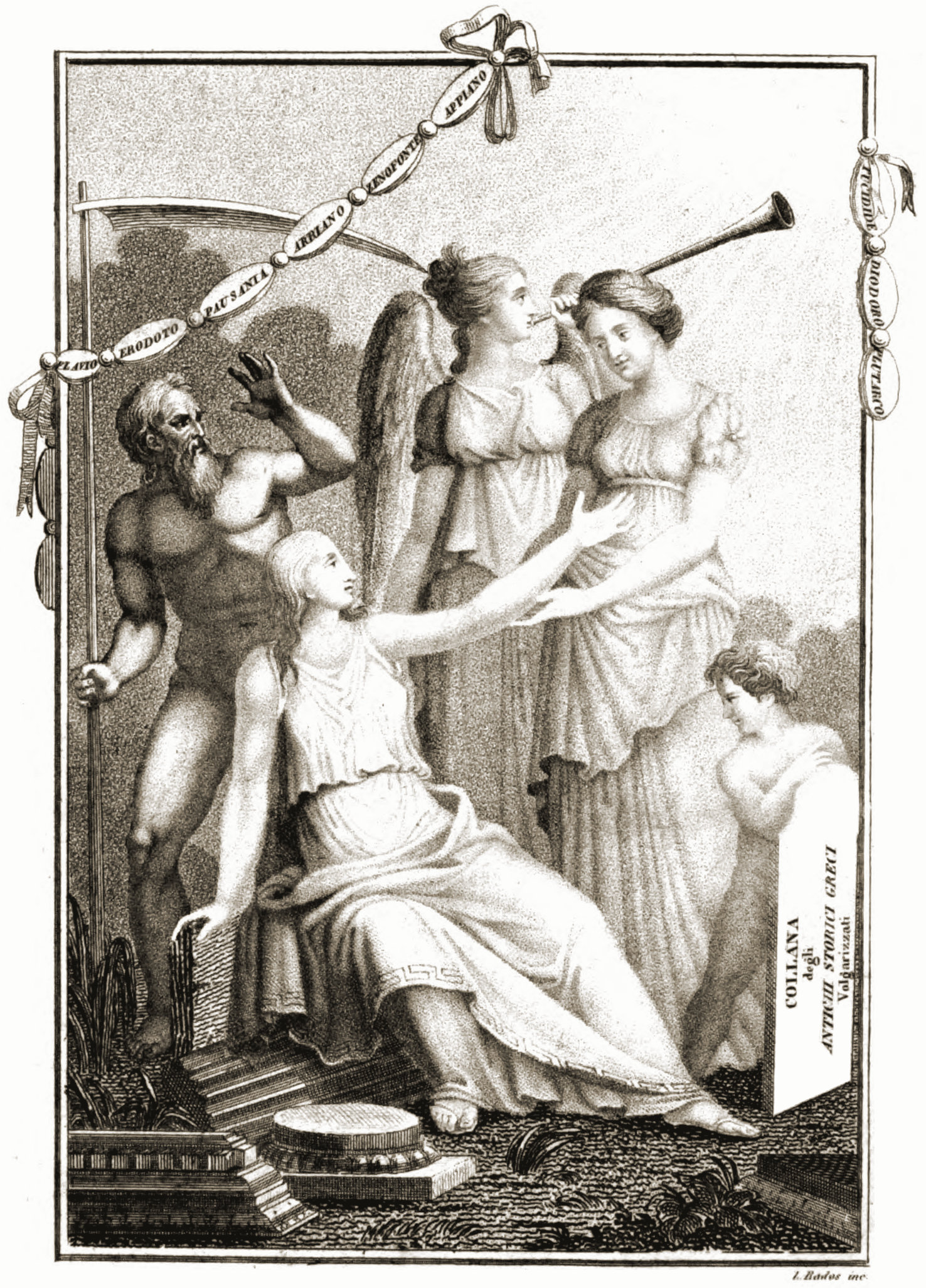 Miniatura del libro: Stratagemmi di Polieno curato da Lelio Carani